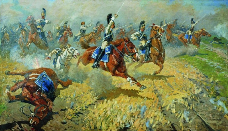 Атака лейб-гвардии Кирасирского его величества полка в 1813 году. 1911 Холст, масло. 148 x 256 см Центральный военно-исторический музей артиллерии, инженерных войск и войск связи